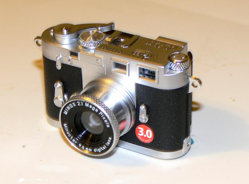 Minox Leica M2.1MP digital camera